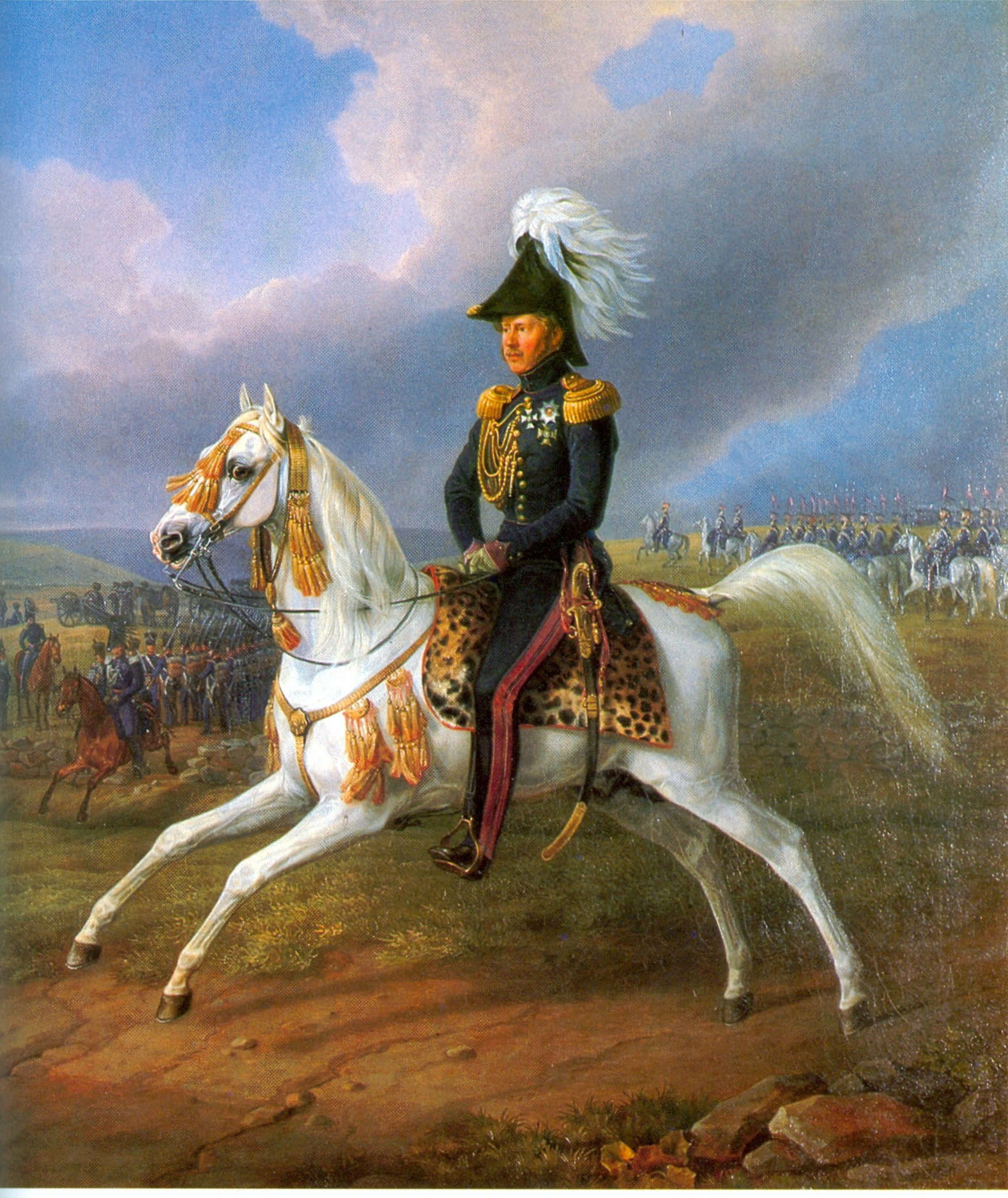 König Wilhelm I. (1816 - 1864) zu Pferde Gemälde von Albert Adam Privatbesitz